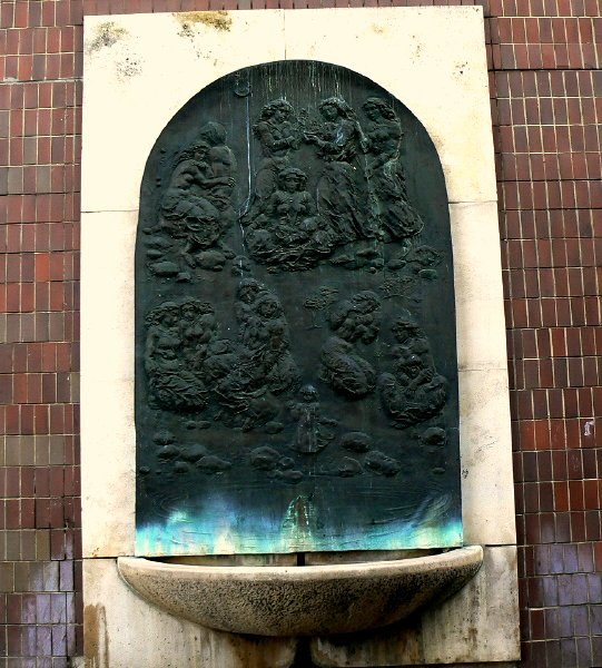 Tóth Valéria: Az élet kútja, bronz dombormű. A Szegedi Orvostudományi Egyetem épületének déli falán látható. 400x200 cm méretű a kútkáva és a keret mészkő. A kút a termékenység, a születés, az emberi élet, a társas viszonyok kibontakozásának szimbóluma, allegóriája. Az érzékletesen mintázott bronzfelületen minden az éltető forrás, a víz köré szerveződik az emberi gondoskodás, itt szökken szárba az élet fennmaradását jelképező búzakalász. A figurák plasztikája alig emelkedik ki a síkból, a jeleneteket az érzékenyen mozgatott drapériák hullámzása, a környezetet érzékeltető vibráló felületjáték fűzi össze. DM 1979. április 30.